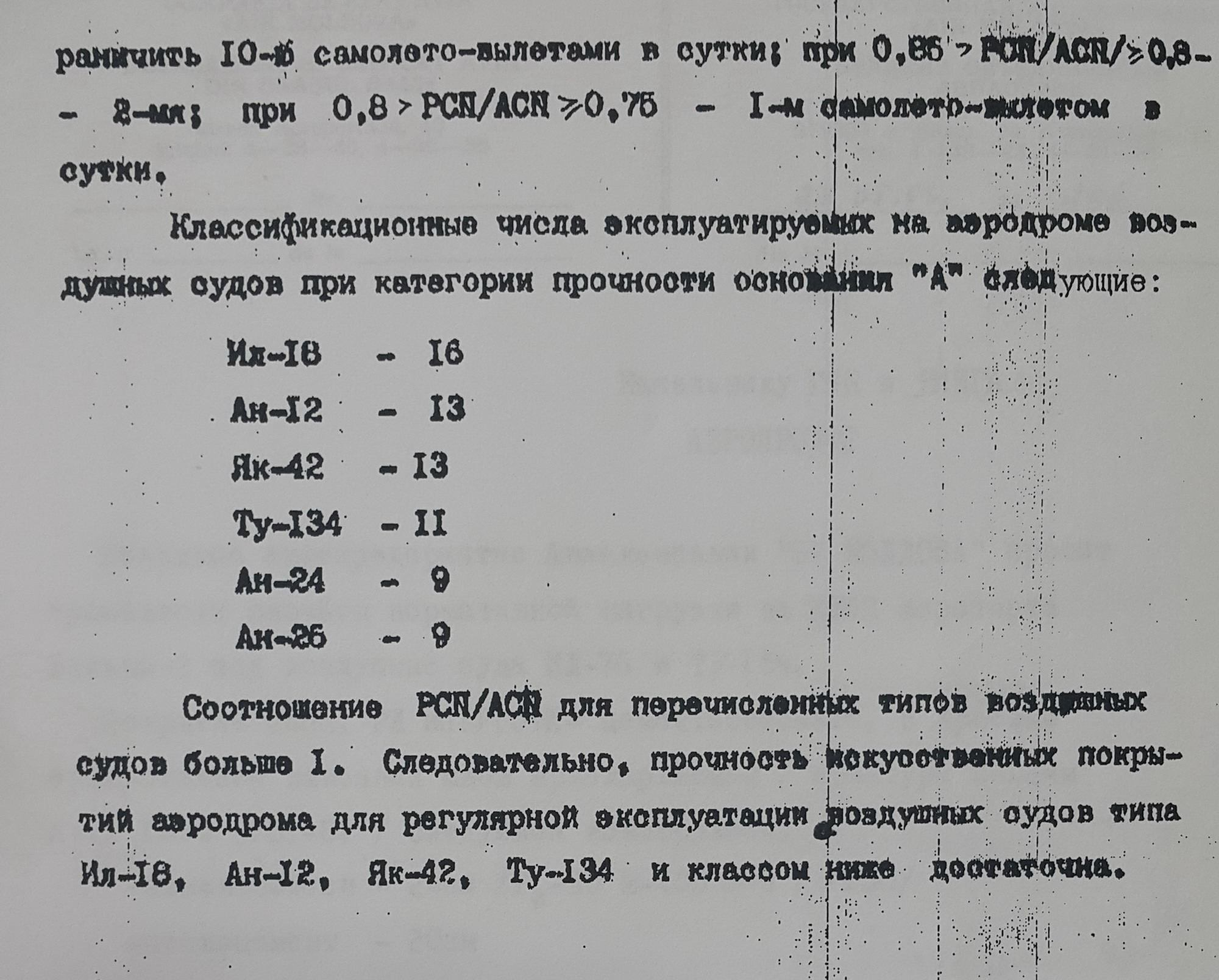 Заключение о прочности искусственных покрытий аэропорта Бельцы-Лядовены